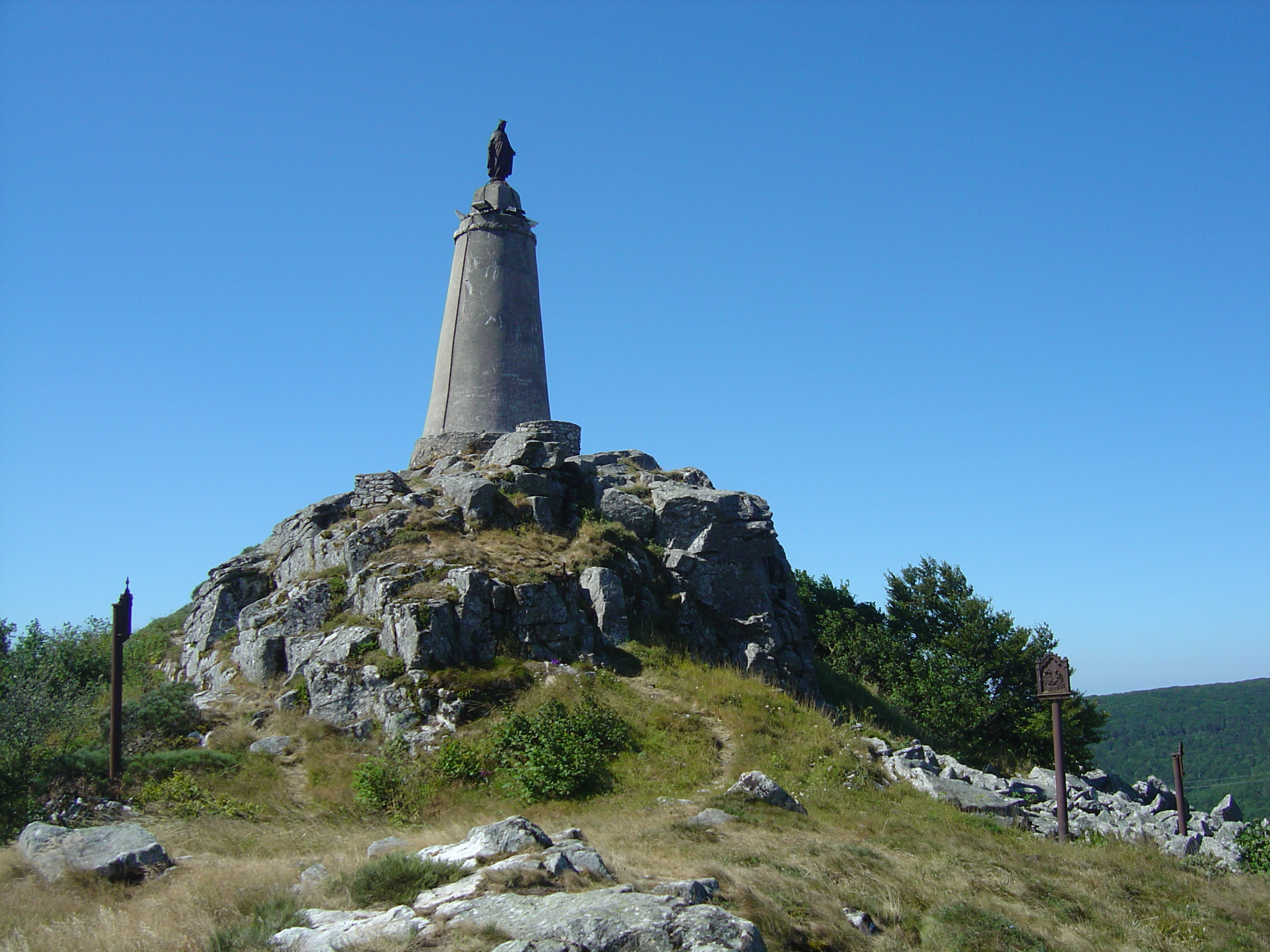 Vierge du roc de Montalet (1259m) - Lacaune (Tarn)